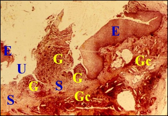 Otite moyenne intense avec bourgeon charnu ("polype") dans la paroi ulcérée d'un cholestéatome